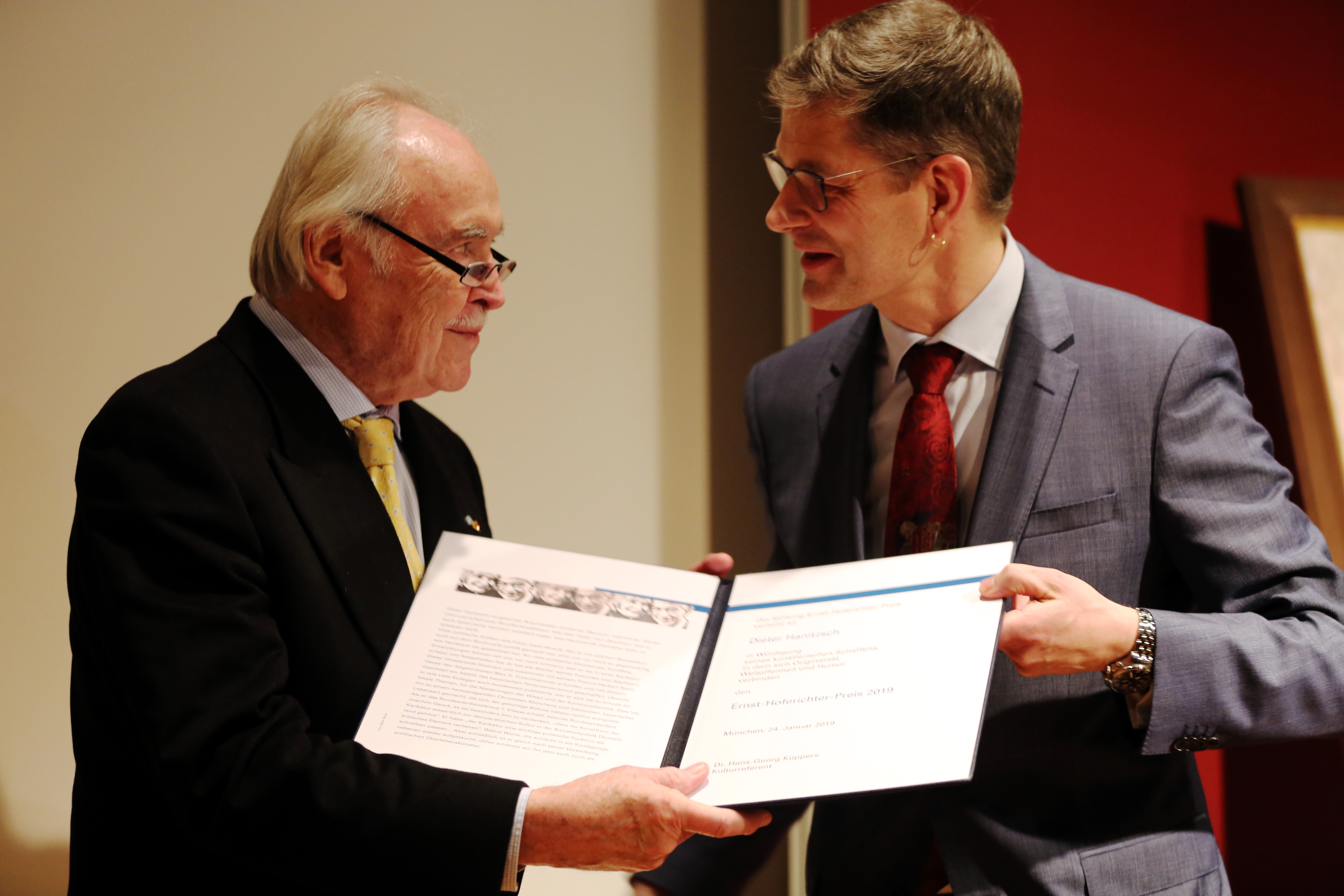 Dieter Hanitzsch und Arne Ackermann, Direktor deer Münchner Stadtbibliothek, bei der Verleihung des Ernst-Hoferichter-Preises 2019 an Dieter Hanitzsch im Münchner Literaturhaus